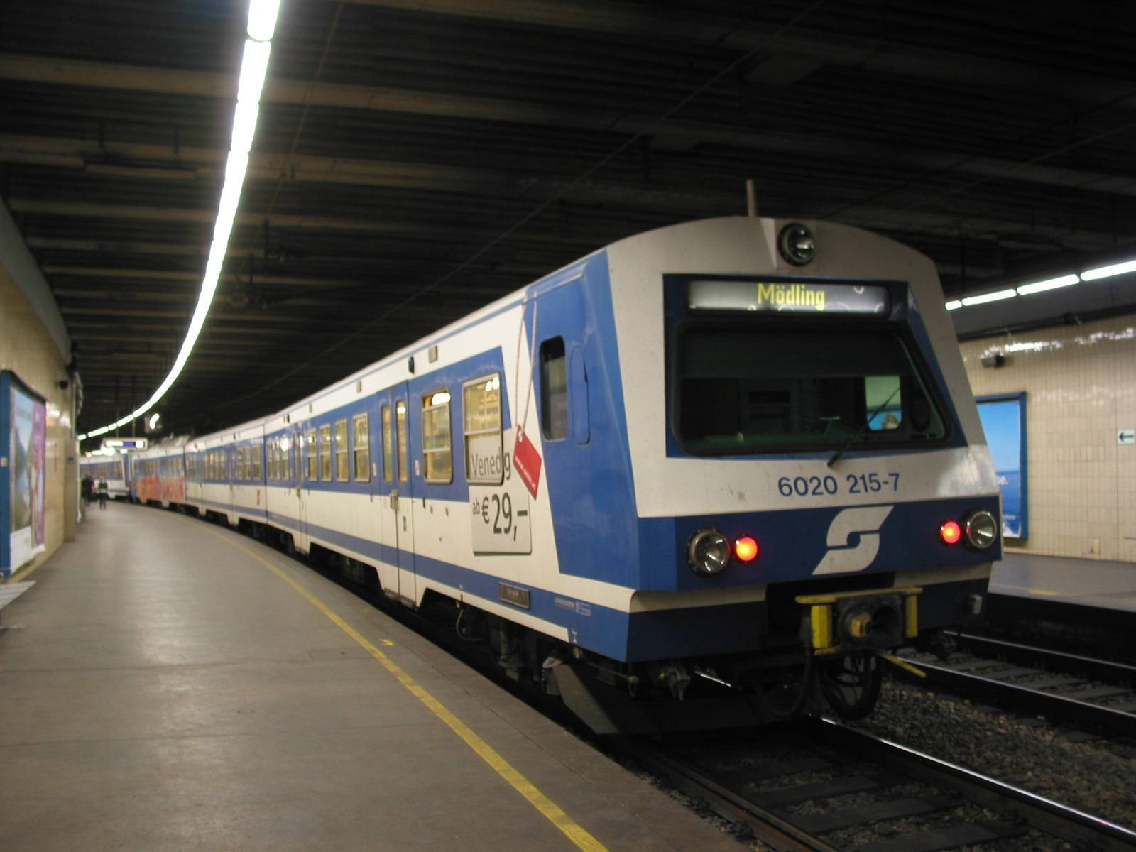 de: Haltestelle Südbahnhof 4020 215-7 en: Station Bisamberg 4020 215-7 EMU